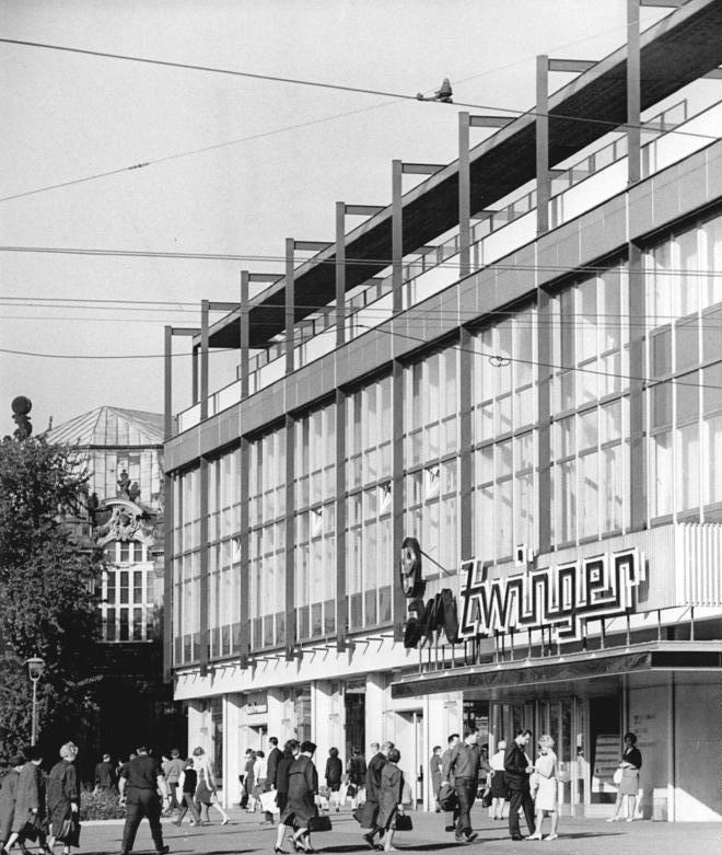 Dresden, Großgaststätte Zentralbild Reiche 24.10.67 Dresden: Haupteingang zur HO-Großgaststätte am Zwinger, die am 1.5.67 eröffnet wurde.